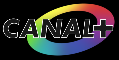 Logo de Canal+ réalisé par Étienne Robial et Mathias Ledoux. Logo de 1984 à 1990.